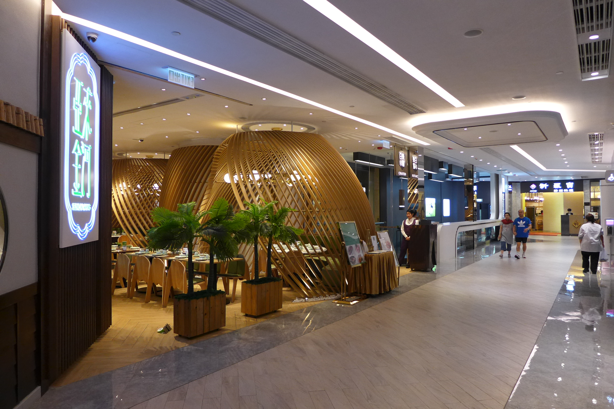 Miramar Shopping Centre Level 4 Restaurants